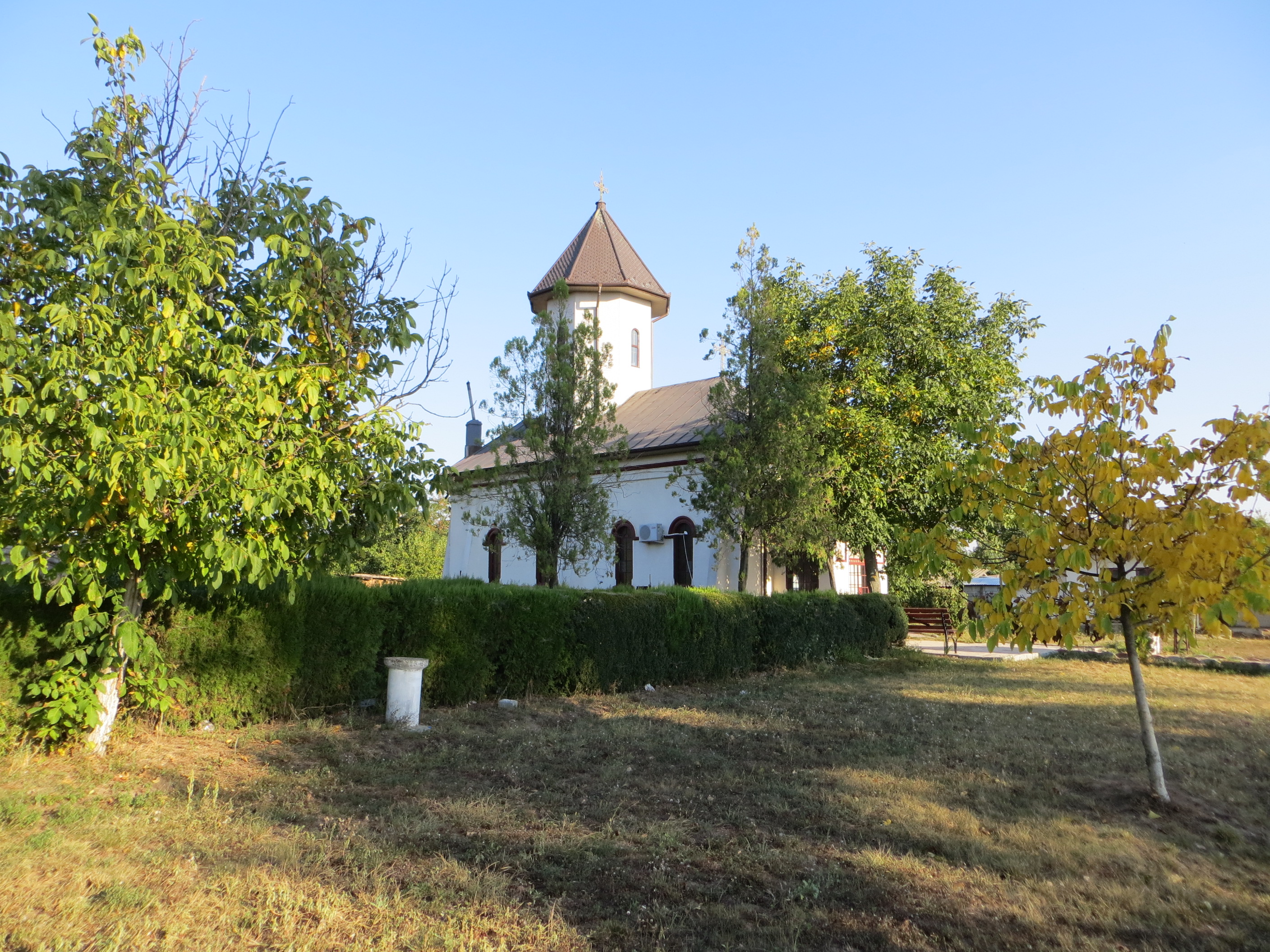 Biserica "Sf. Gheorghe"